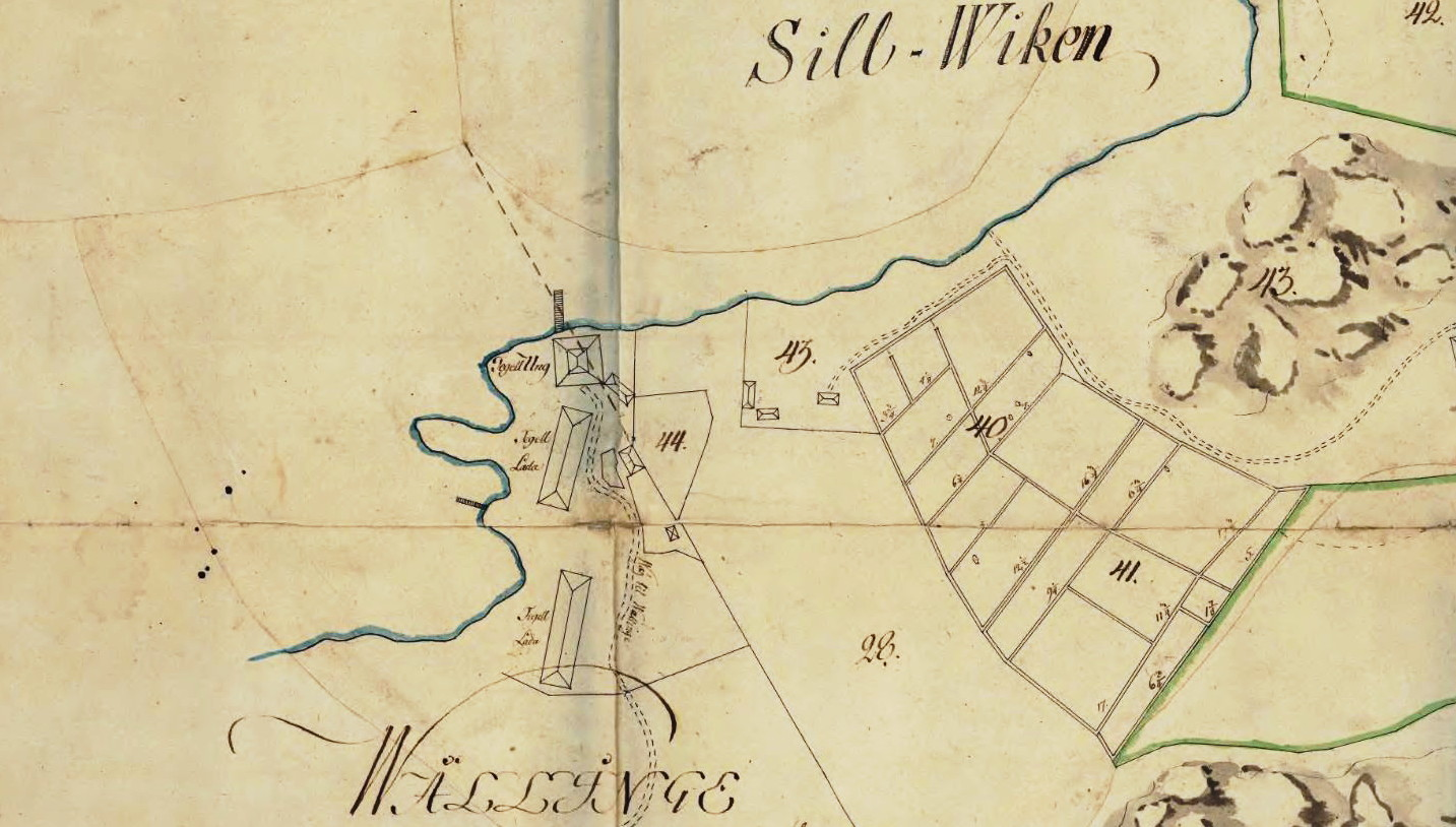 Del av karta över Sturehovs ägor visande Vällinge tegelbruk